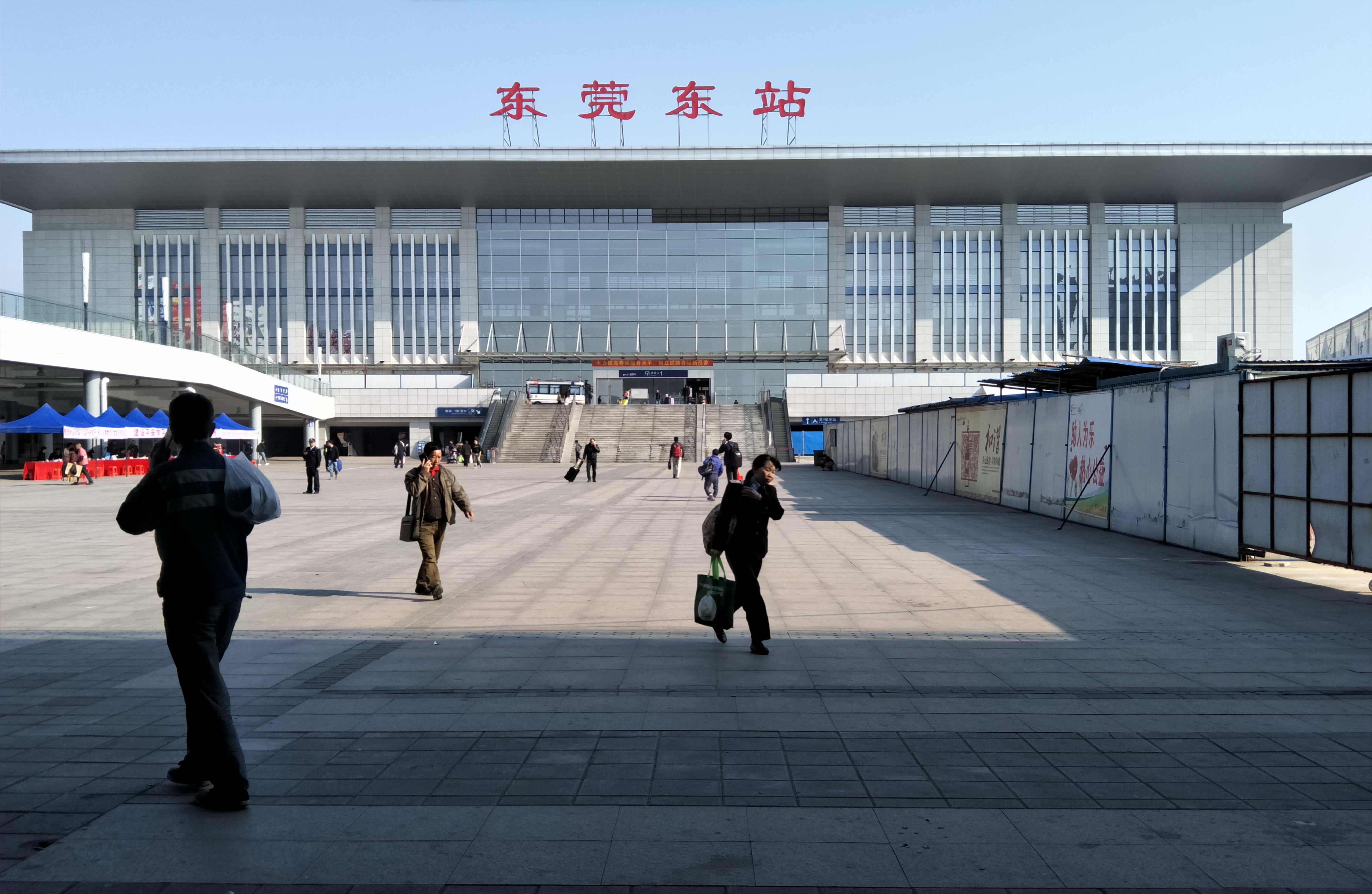 东莞东火车站（扩建后）